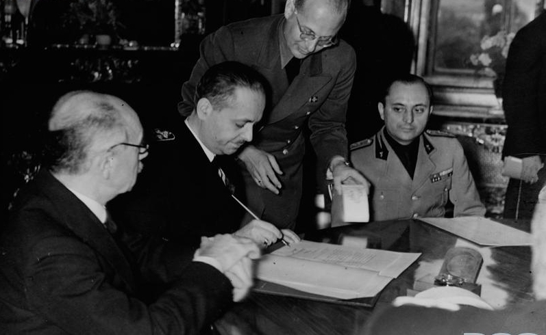 El ministro de Exteriores húngaro István Csaky firmando el Segundo Arbitraje de Viena. A la izquierda de espaldas el primer ministro húngaro, el conde Pál Teleki.